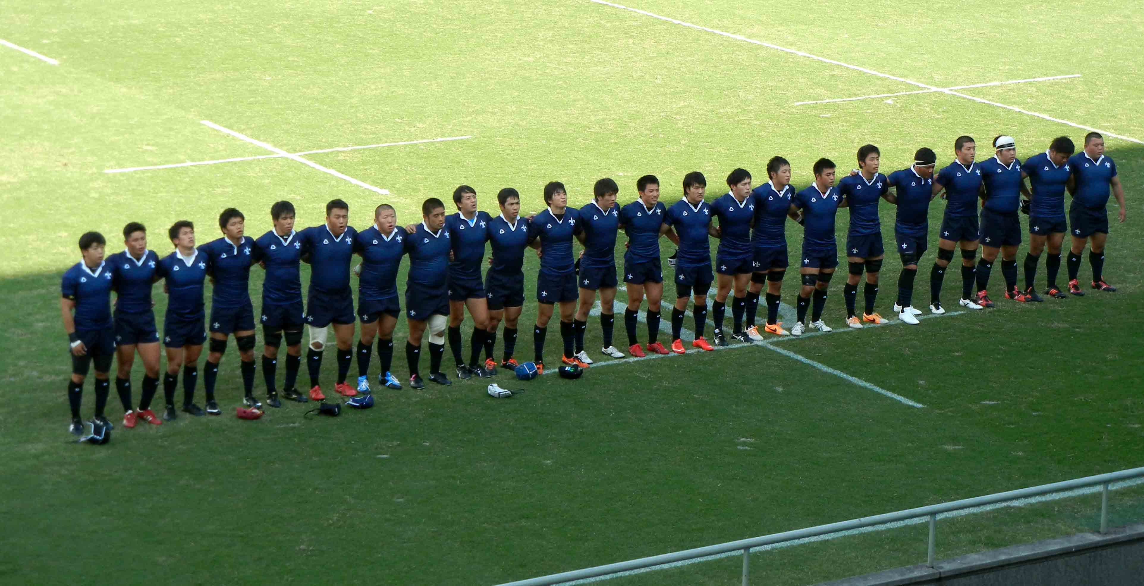 試合前の立教の選手達